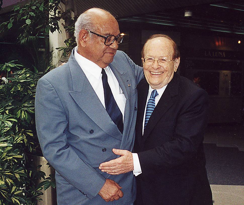 George Rosenkranz and Luis Miramontes